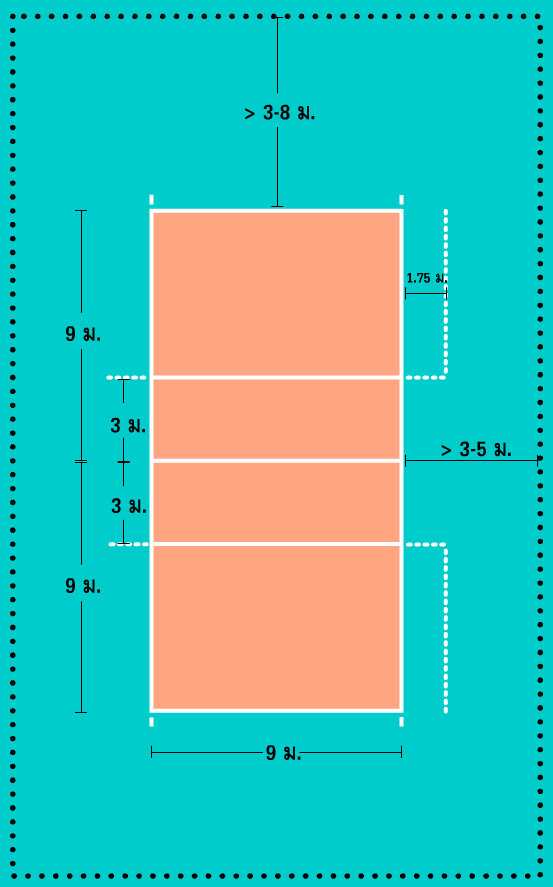 สนามวอลเลย์บอล